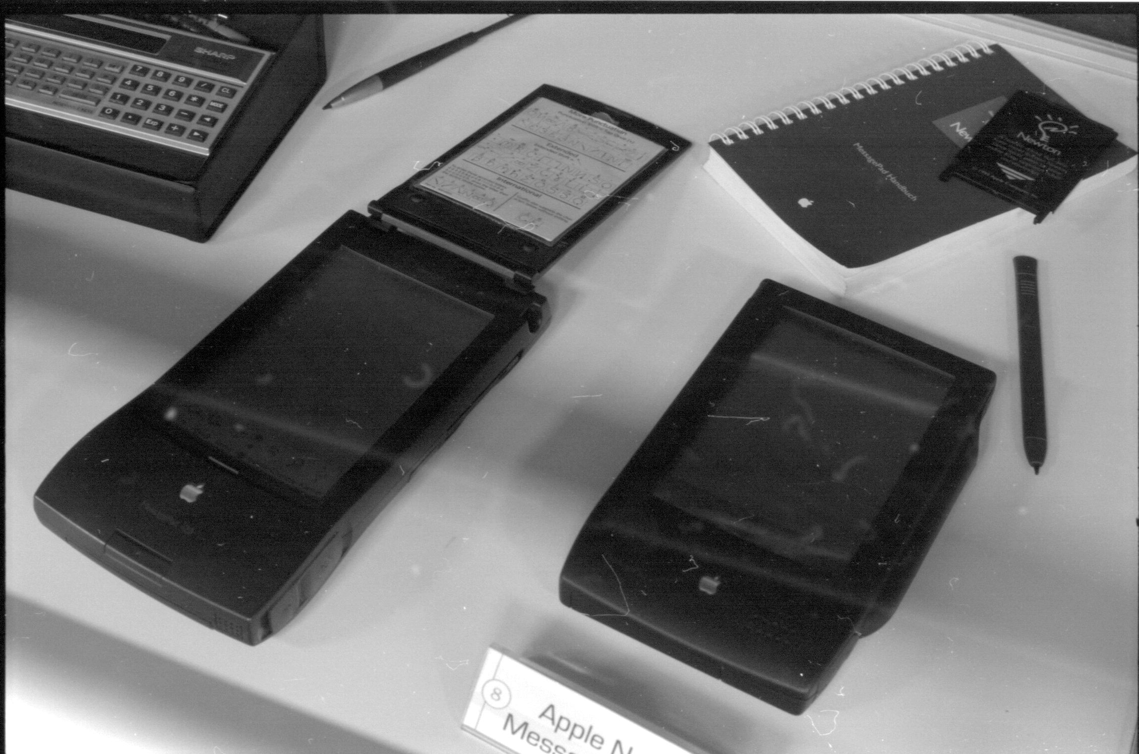 Apple MessagePad 100. On display at the Musée Bolo, EPFL, Lausanne.